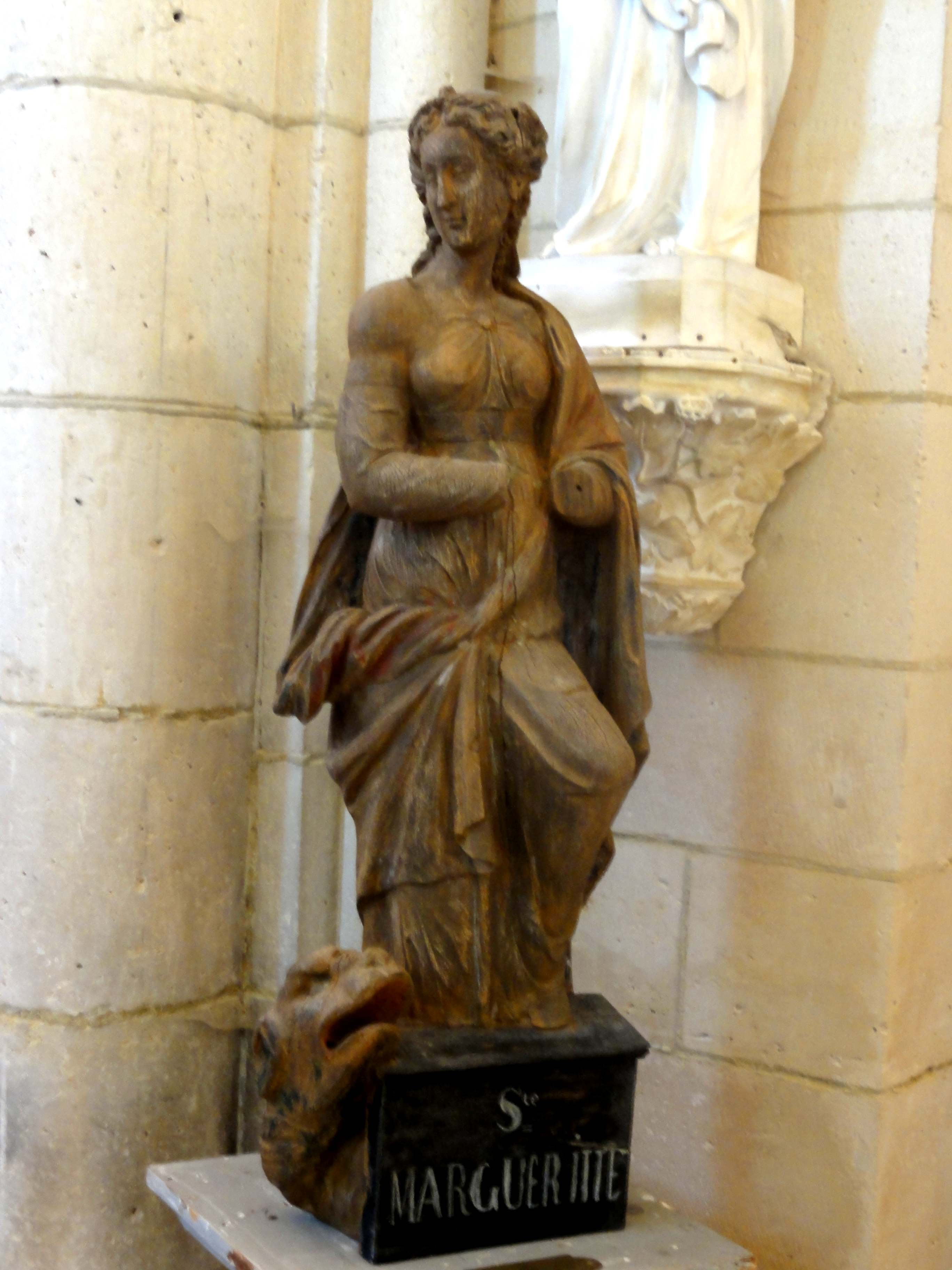 Statue de la sainte patronne de l'église (apparemment en bois).